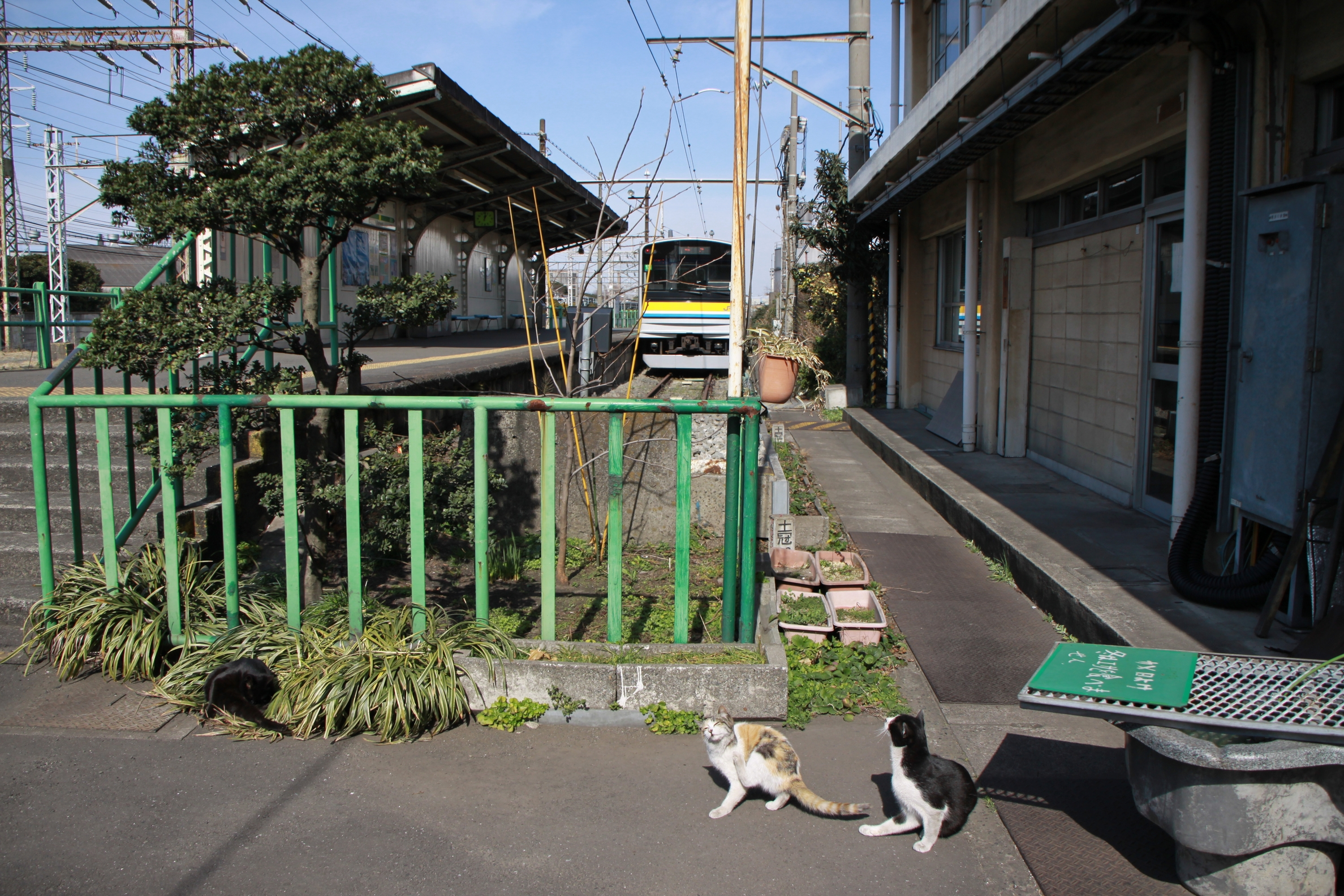 鶴見線扇町駅にいる猫